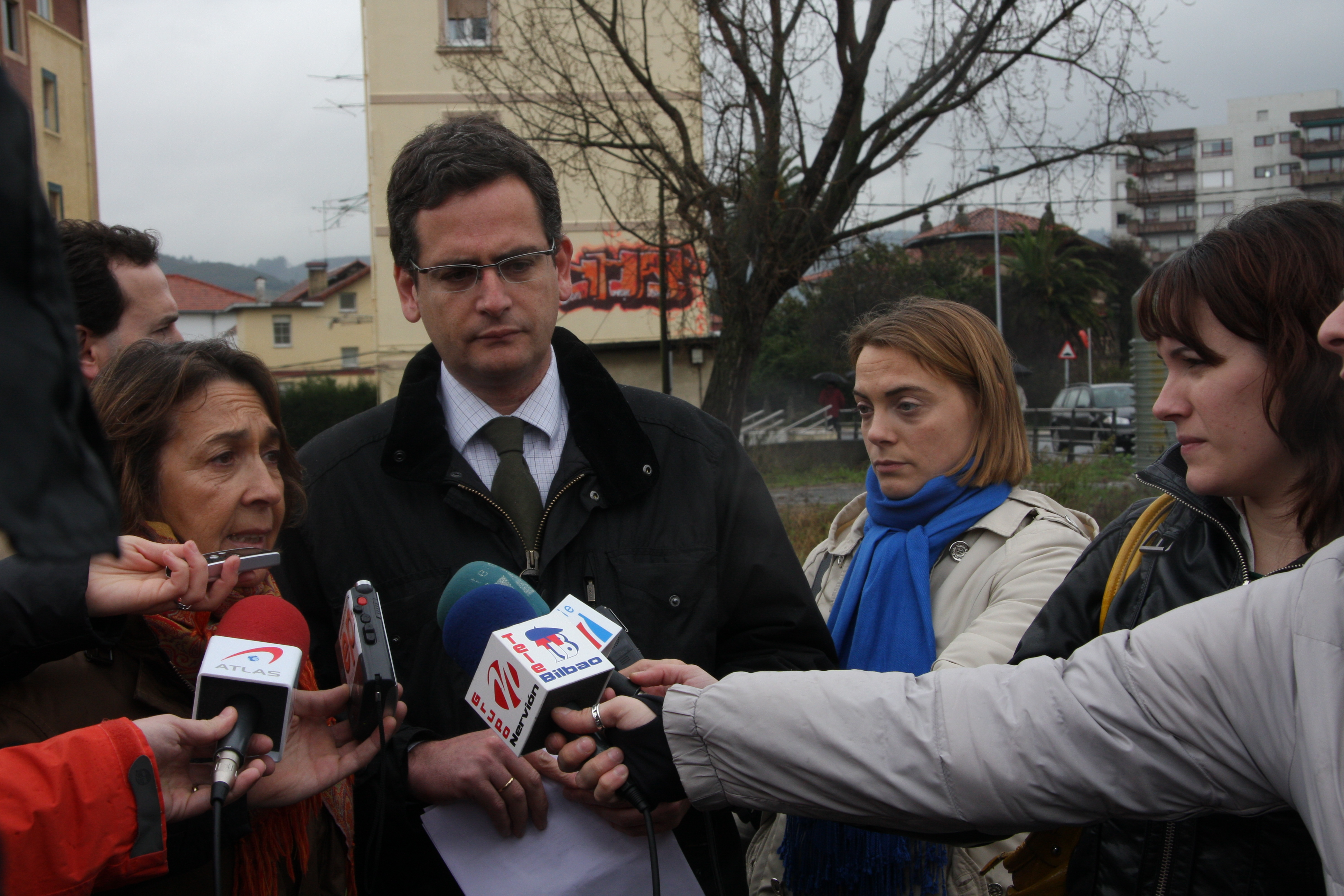 Antonio Basagoiti en una visita a Algorta durante la precampaña de las elecciones autonómicas vascas de 2009 (28 de enero).